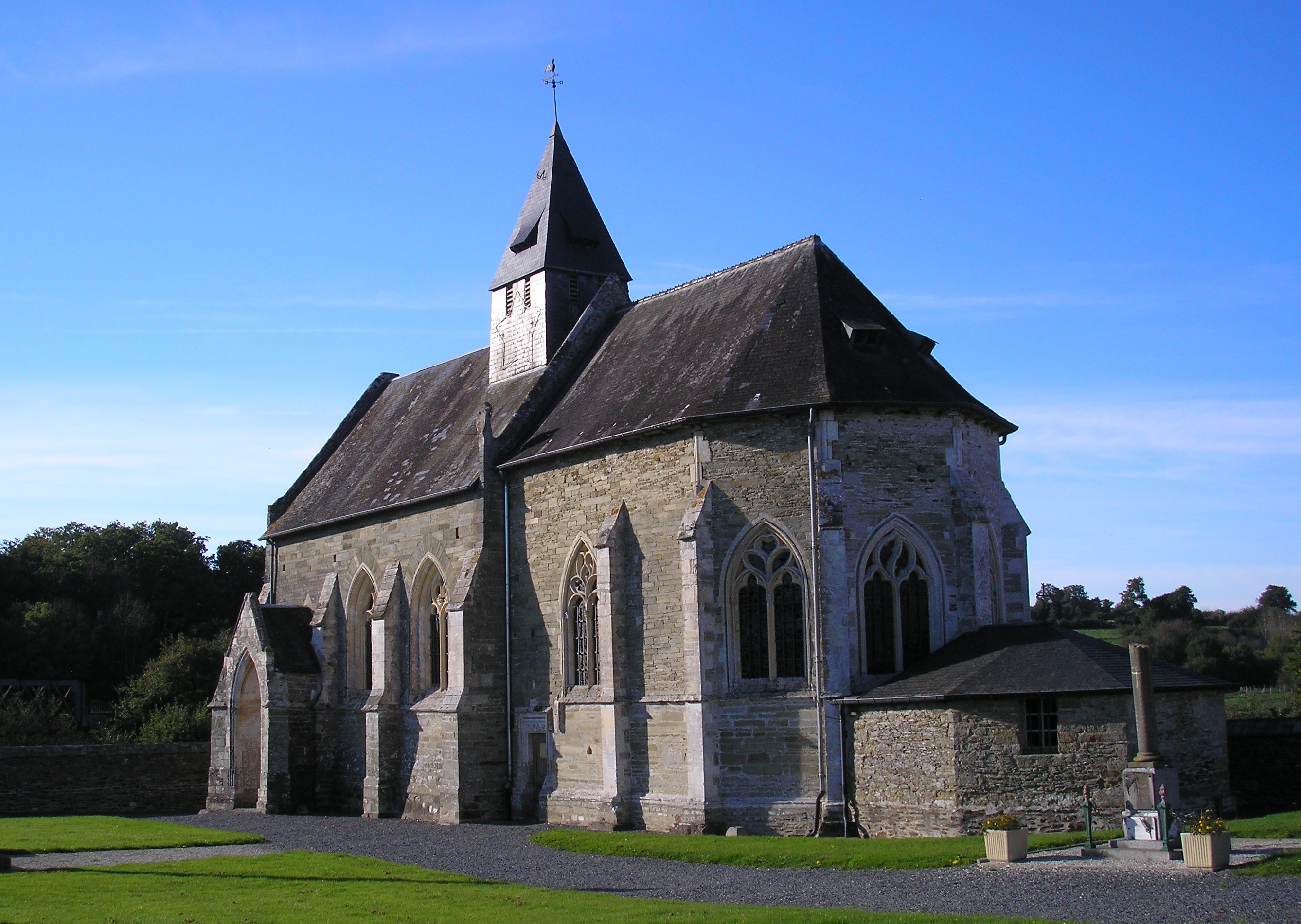 Sainte-Suzanne-sur-Vire (Normandie, France). L'église.